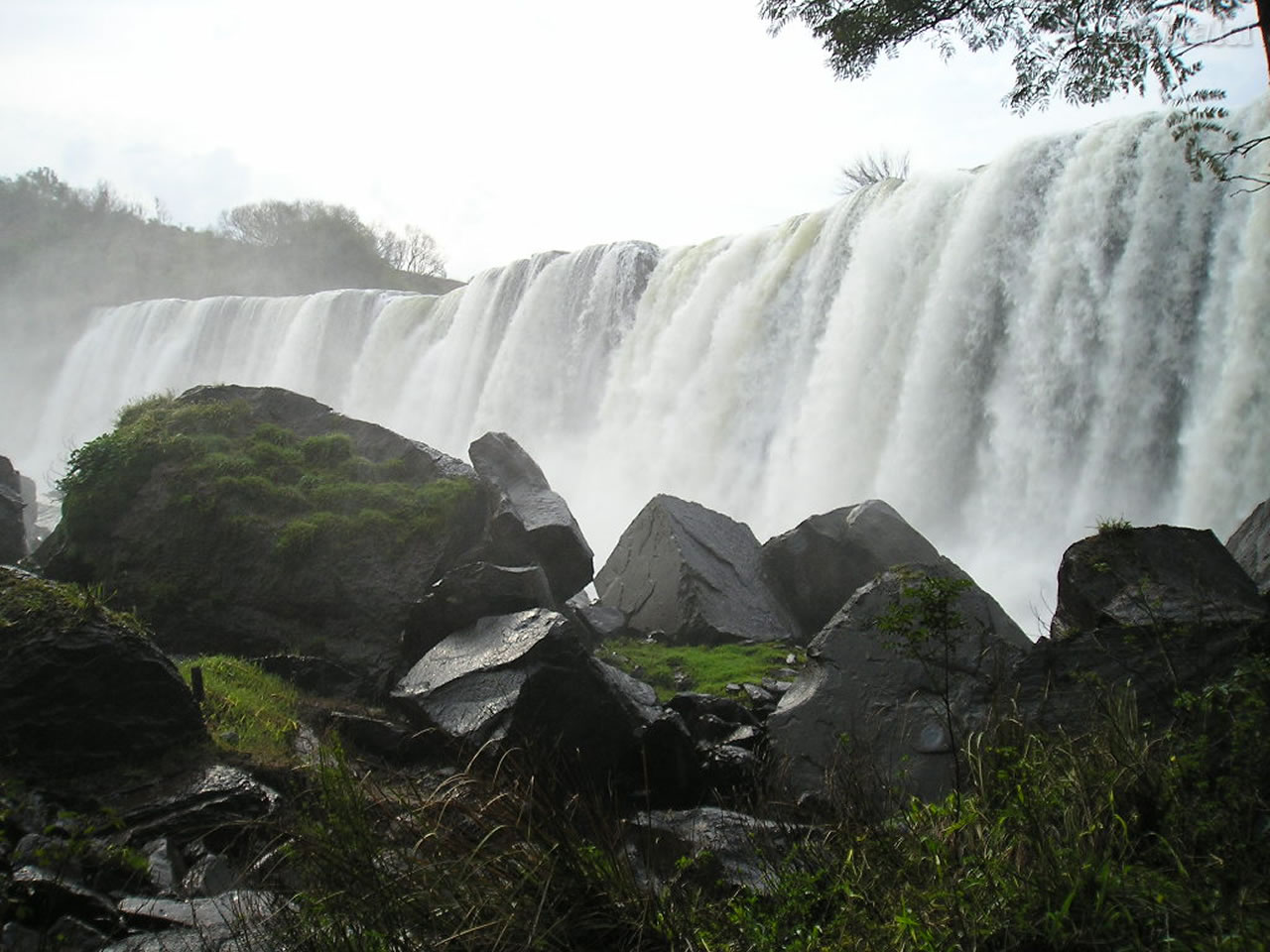 xxeeee